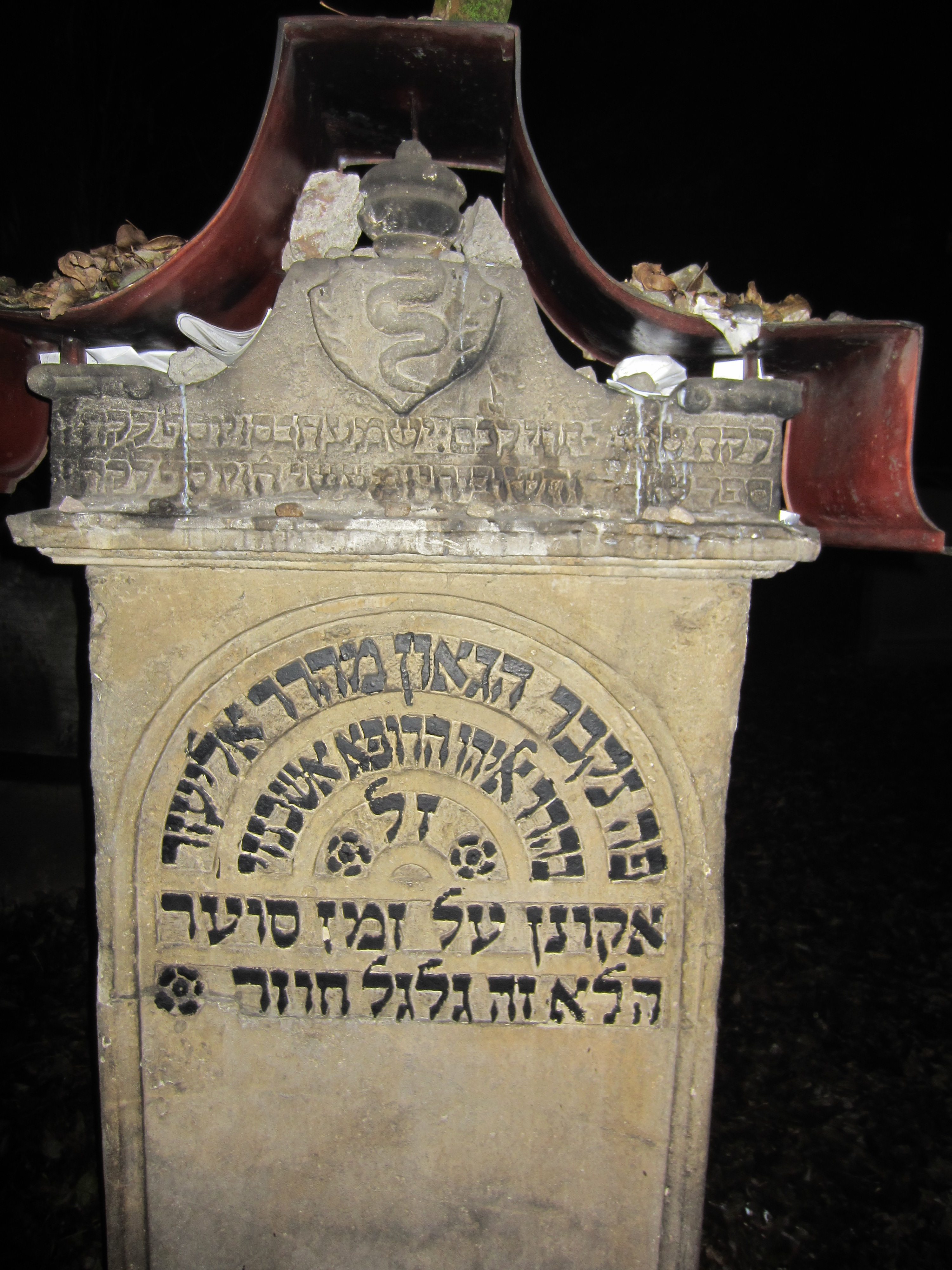 מצבת הרב אליעזר אשכנזי, בית הקברות היהודי העתיק בקרקוב.jpg